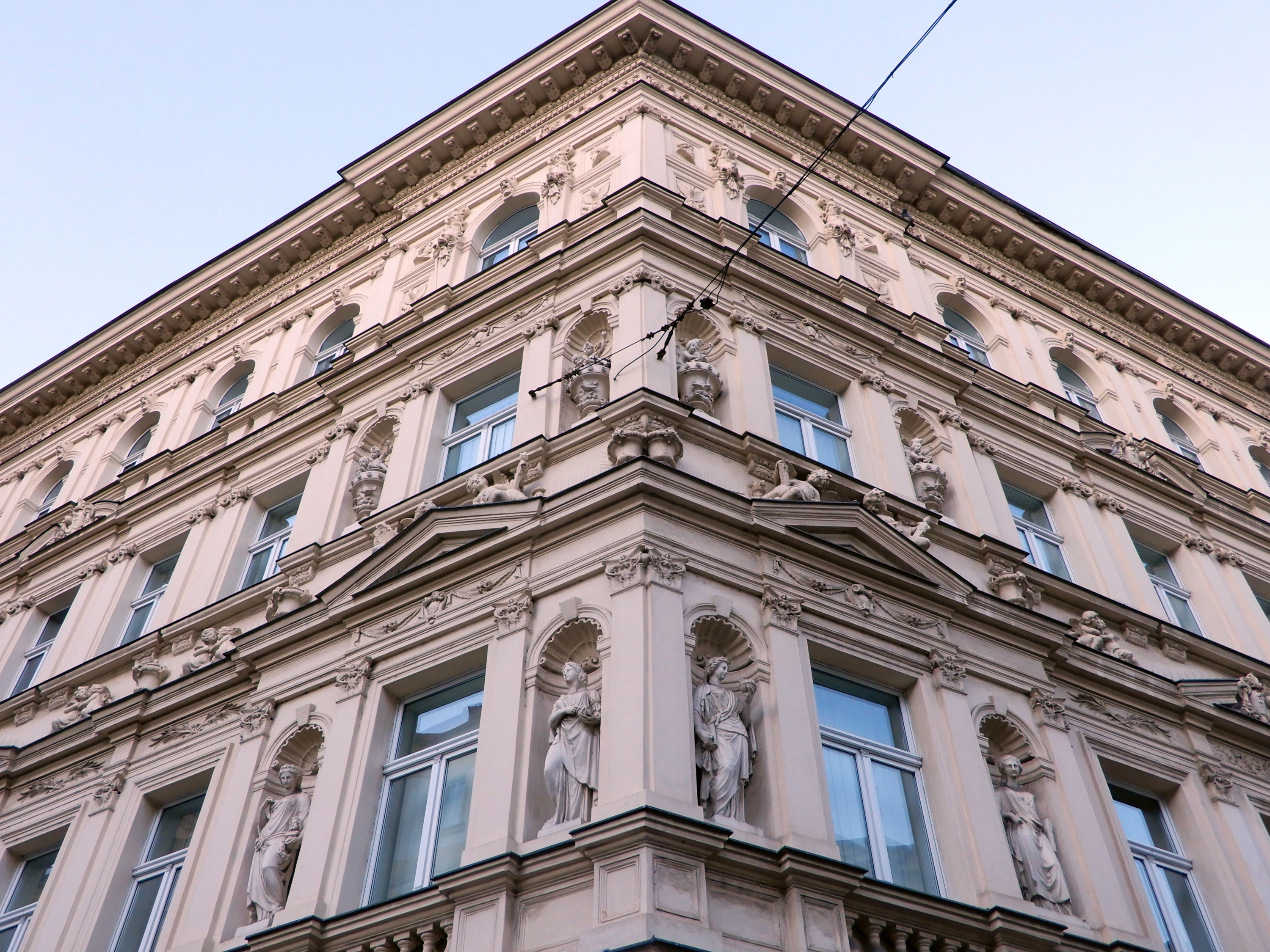 Rohový dům čp. 599-VII, třída Milady Horákové, Praha 7- Holešovice- fasáda se sochami múz